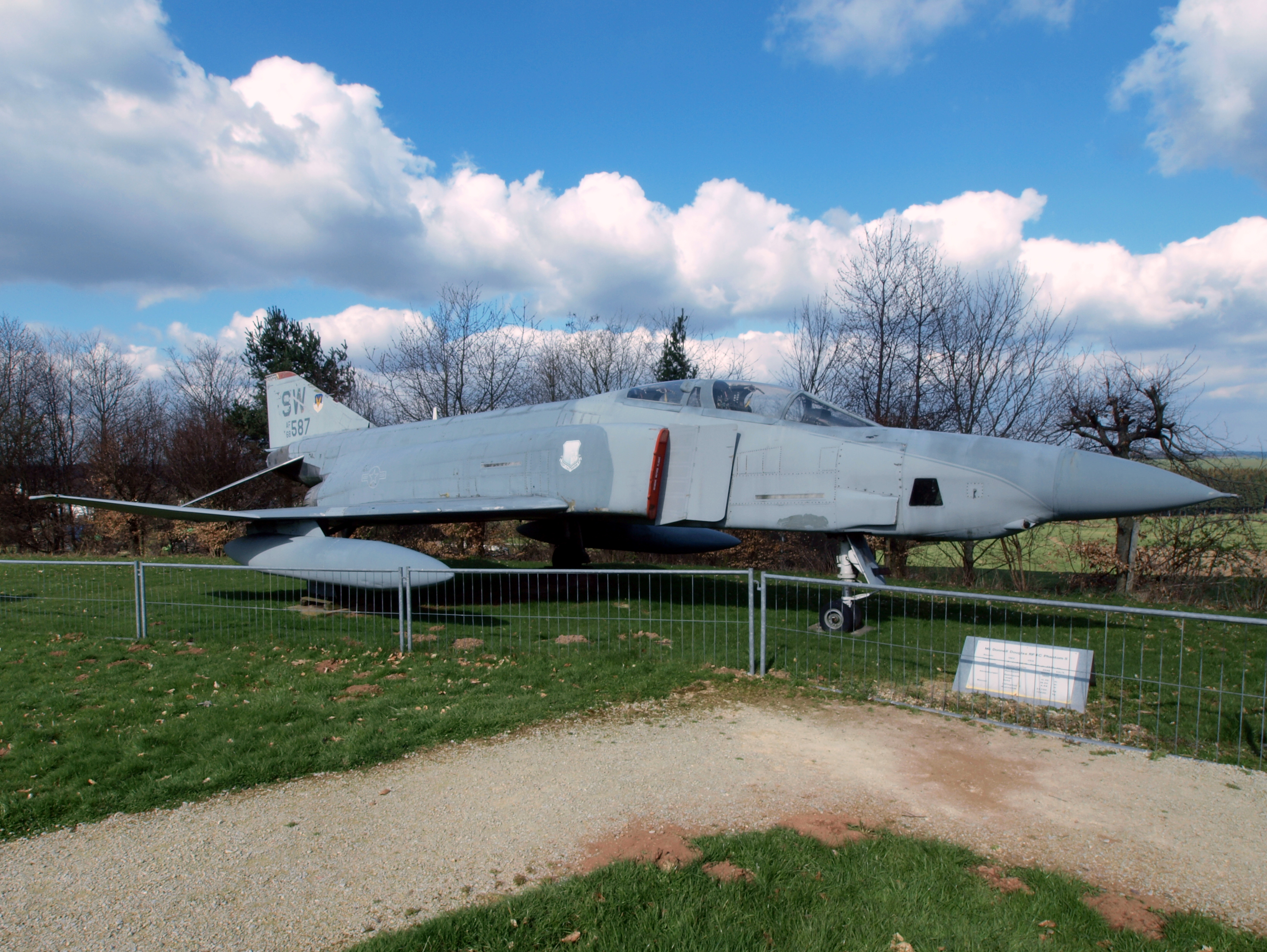 Photographed at Hermeskeil.